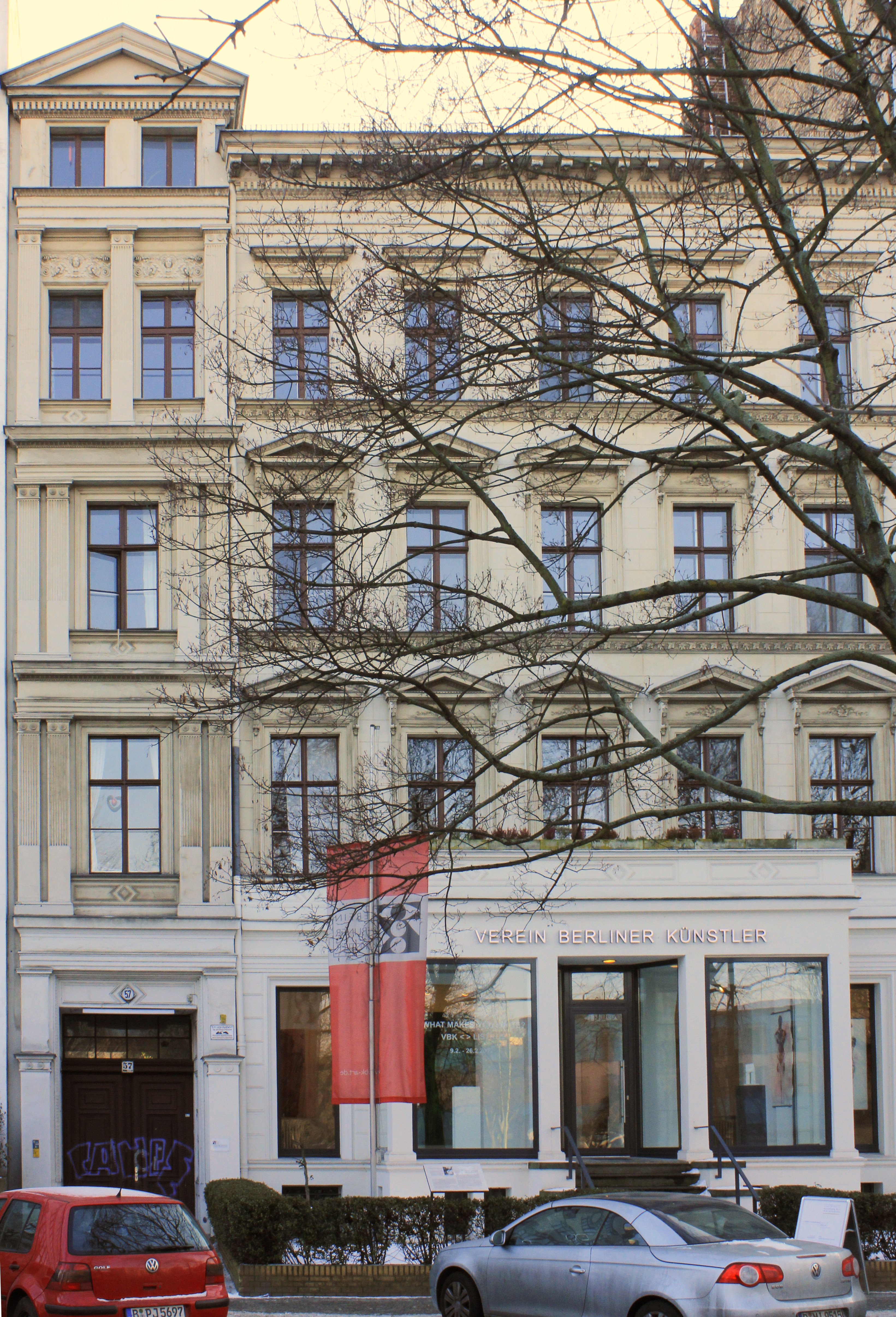 Mietshaus 1858-59 von W. Reiniger und R. Hosemann